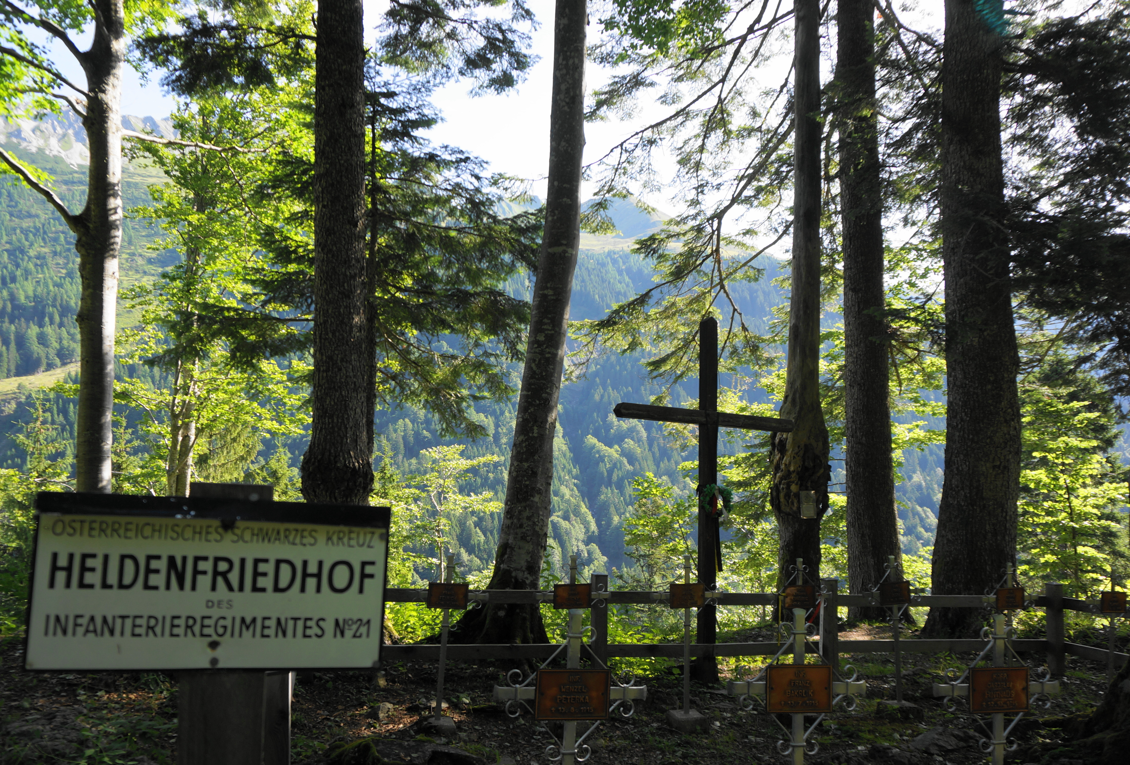 Heldenfriedhof Infanterieregiment No. 21 aus Čáslav, Kötschach Mauthen, Bezirk Hermagor, Kärnten, Österreich, EU